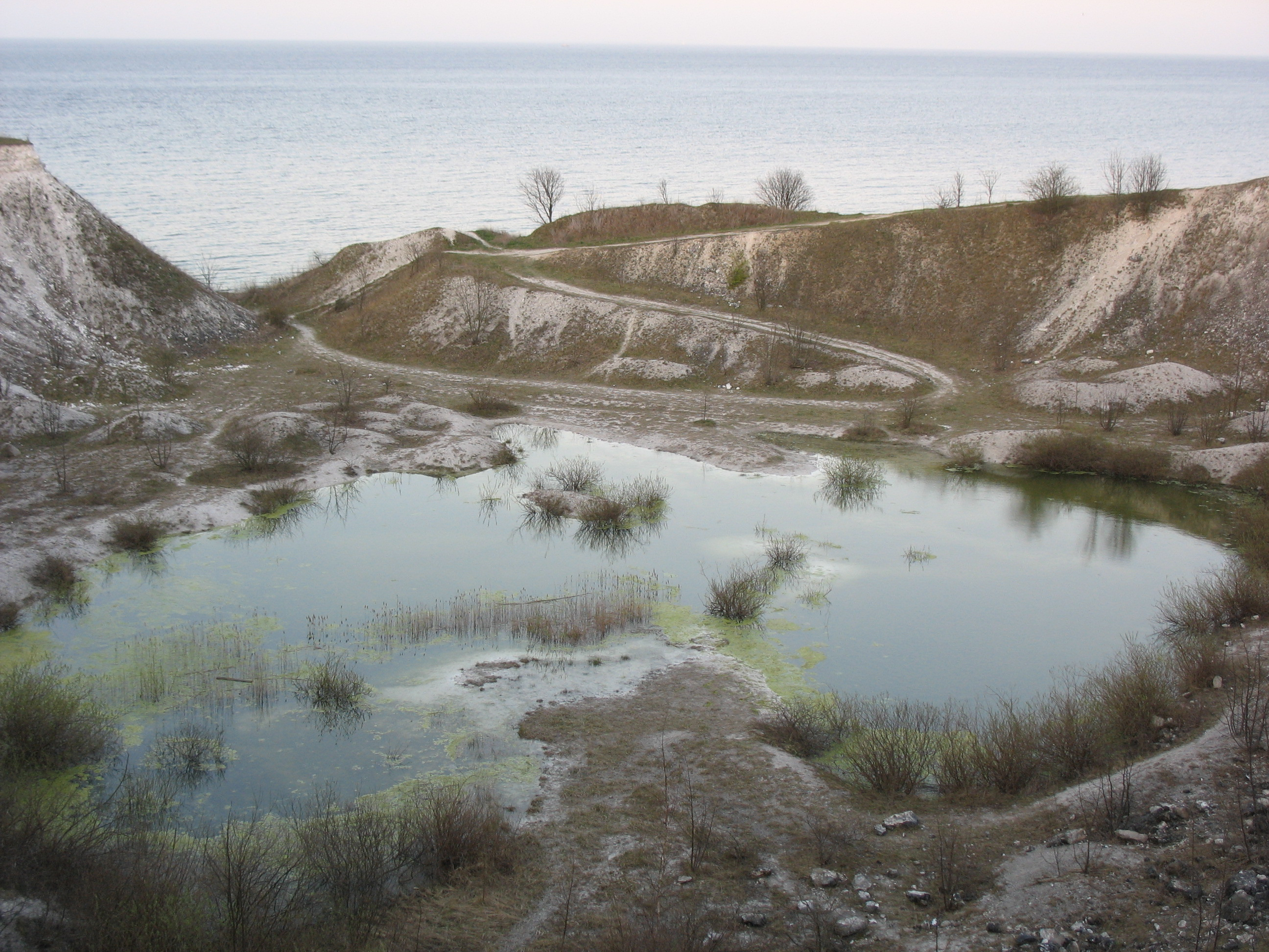 Holtug Kridtbrud fra Stevns Klint